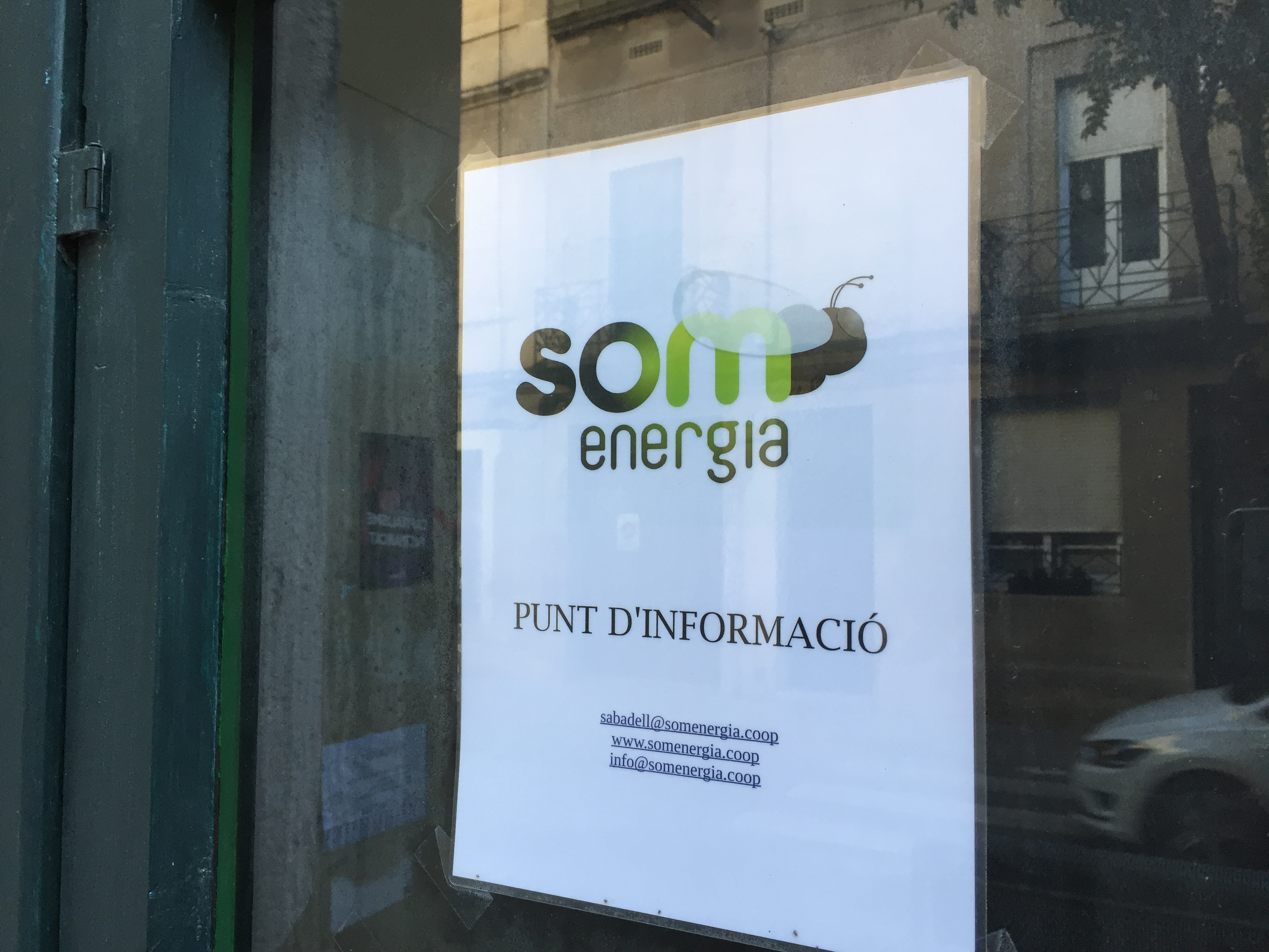 Som energia cartell Sabadell